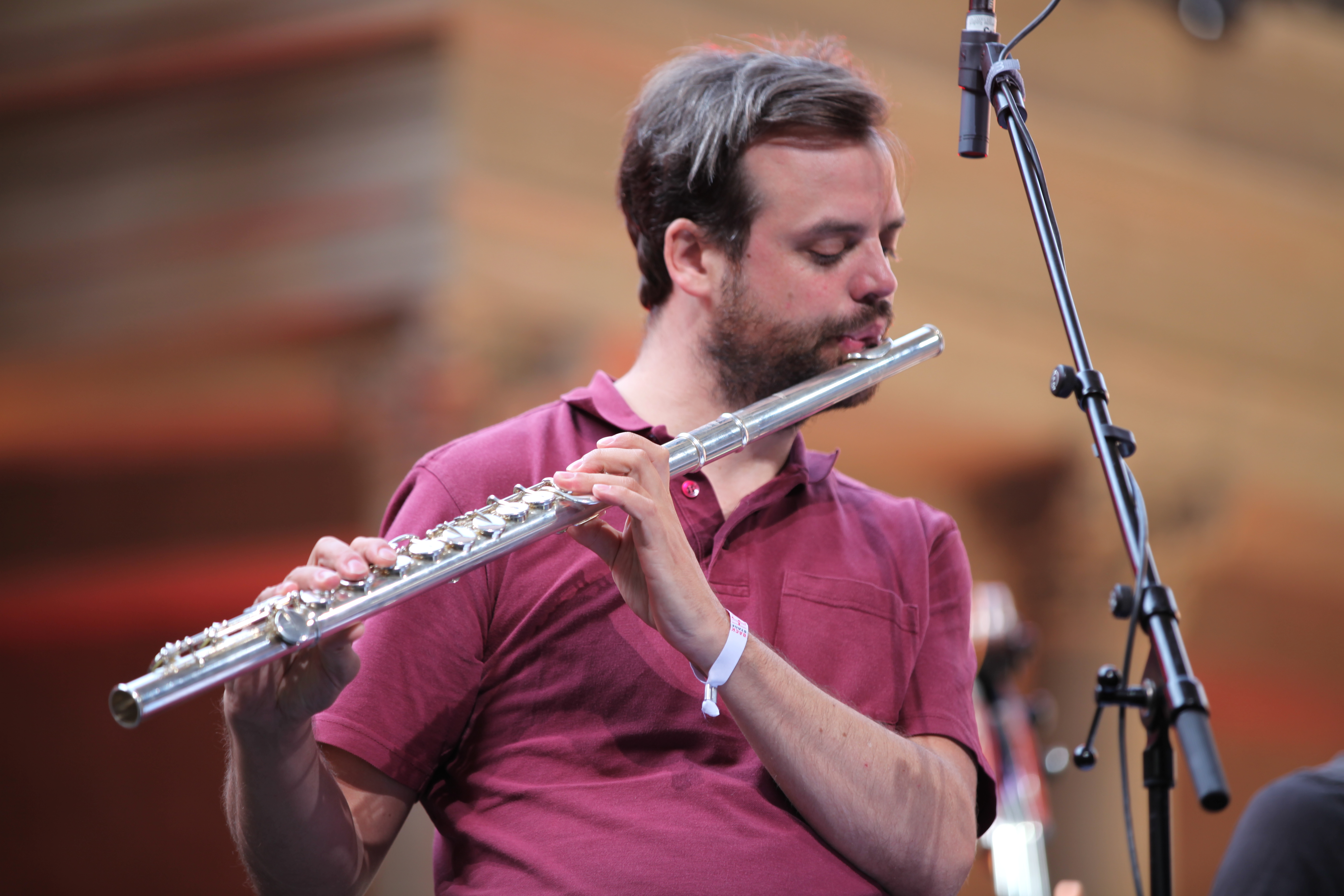 Alien Ensemble auf dem Heimatsound-Festival 2015 in Oberammgergau Oliver Roth mit Altflöte